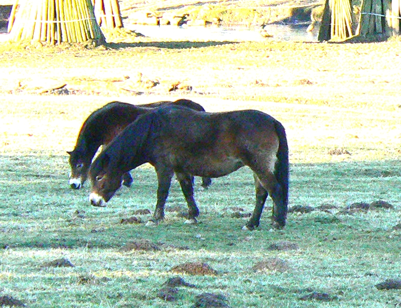 Im Tierpark Sababurg im Reinhardswald (Hessen), Exmoorpony